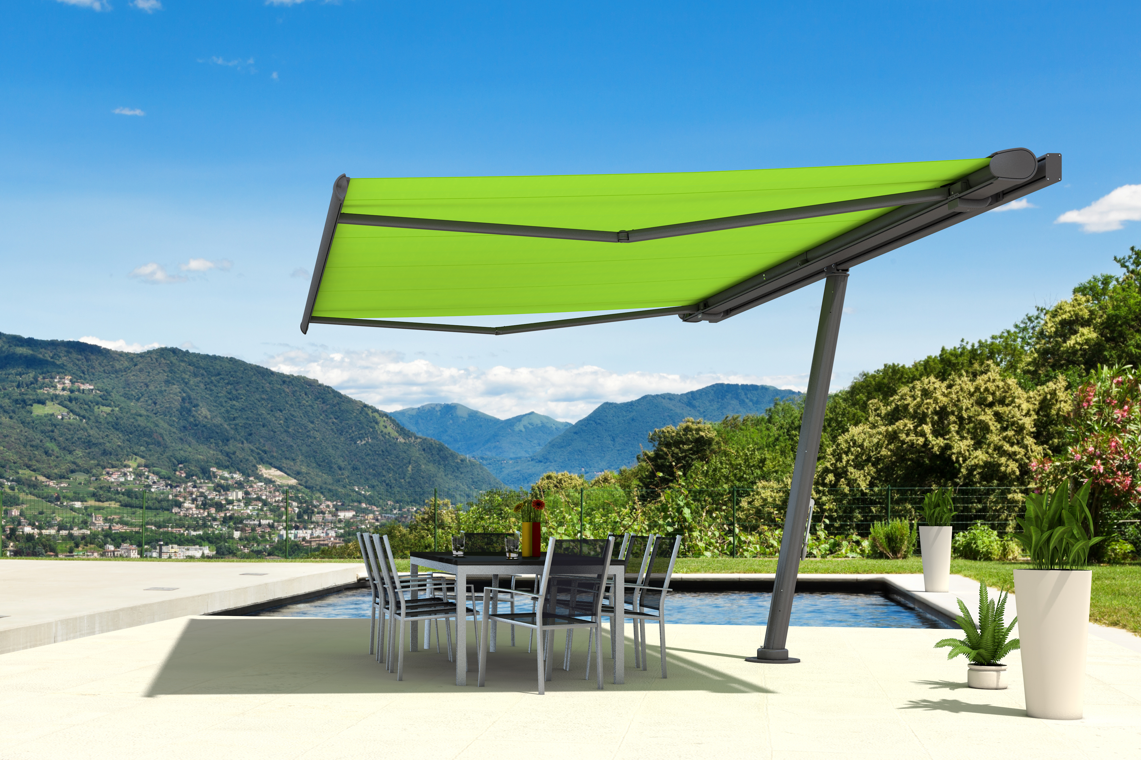 Markisenschirm planet - Eine Kombination aus Markise und Sonnenschirm